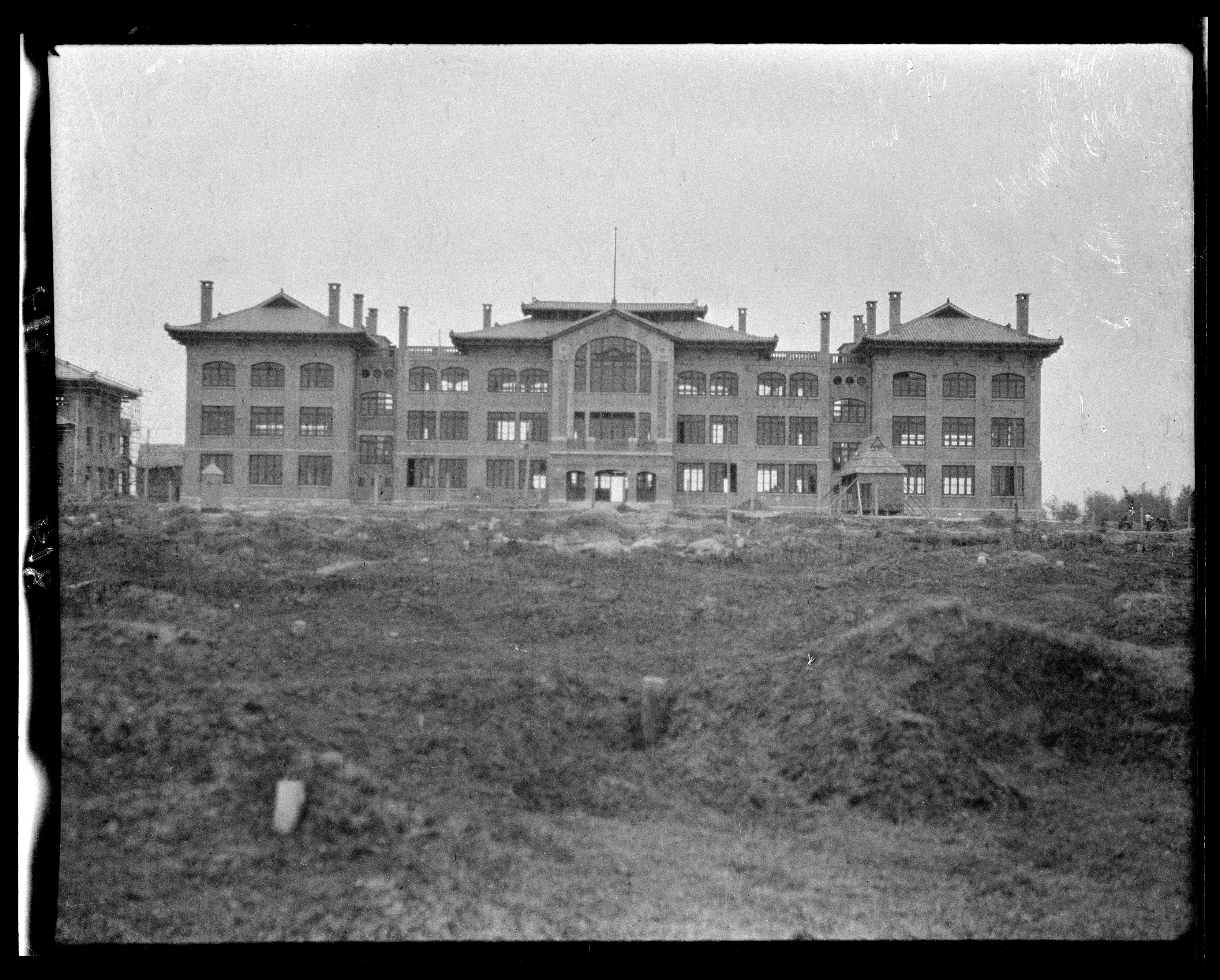 廣州市私立真光女子中學校舍正面